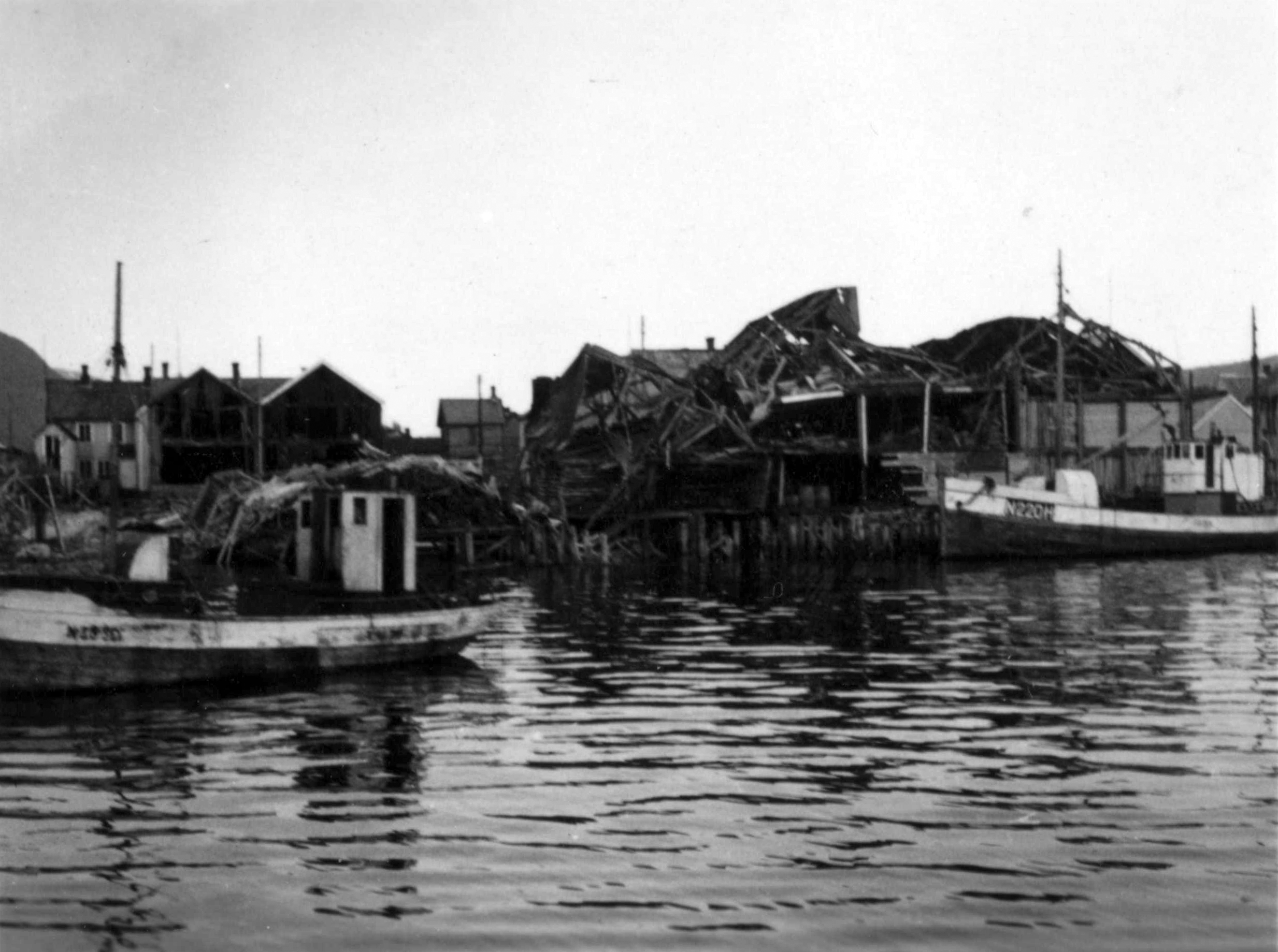 Havna på Hemnesberget etter kampene Tittel / Title: Hemnesberget Dato / Date: 1940 Fotograf / Photographer: Karl Marth Sted / Place: Hemnesberget, Nordland, Norge Eier / Owner Institution: Arkiv i Nordland Lenke / Link: Arkiv i Nordland Arkivreferanse /Archive reference: AIN.NA143.0179 Fra Dag Skogheims Privatarkiv